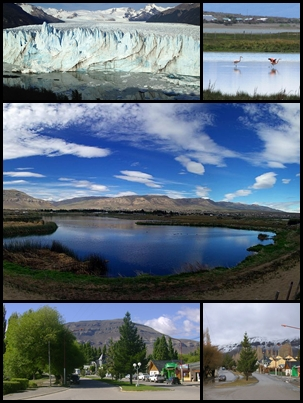 Montaje de El Calafate, Patagonia Argentina